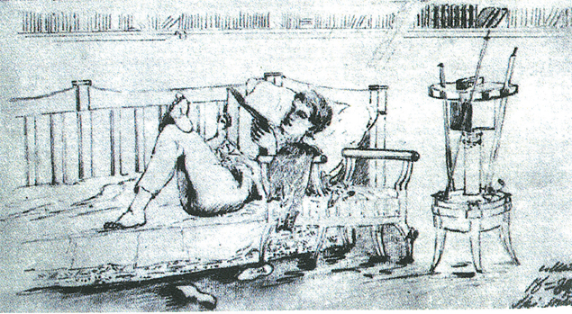 Беларуская (тарашкевіца): Убель (Ubiel), Станіслаў Манюшка (Stanisłaŭ Maniuška) за кнігай